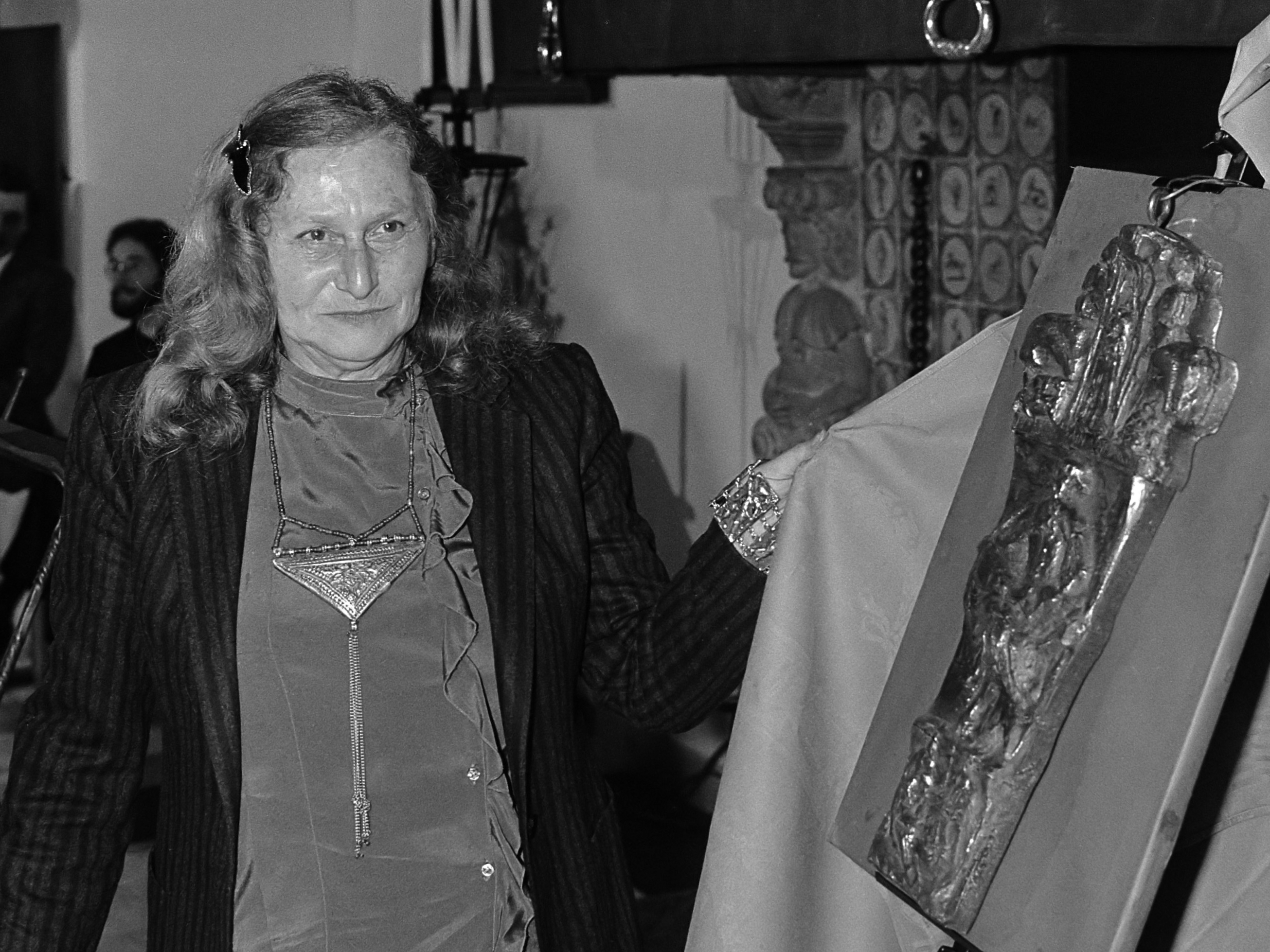 Vier boeken over PC Hooft aan Minister Gardeniers (CRM) aangeboden op Muiderslot t.g.v. feit dat 4 eeuwen geleden PC Hooft werd geboren 10 maart 1981